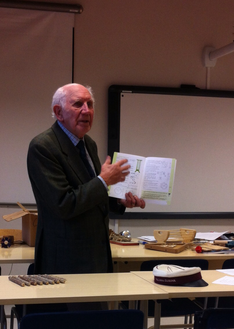 Endel Rihvk, eesti pedagoogikateadlane